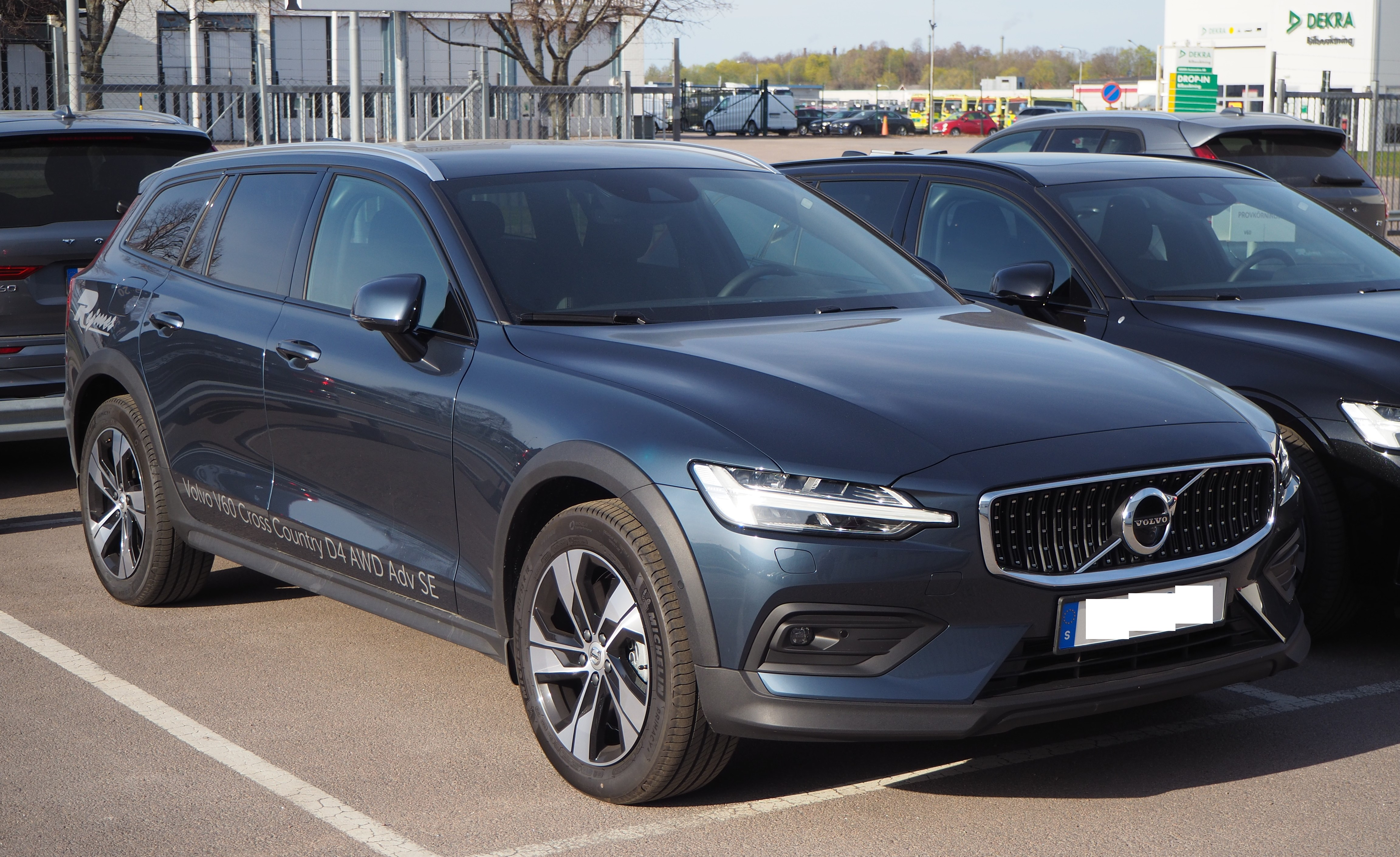 2019 Volvo V60 Cross Country D4